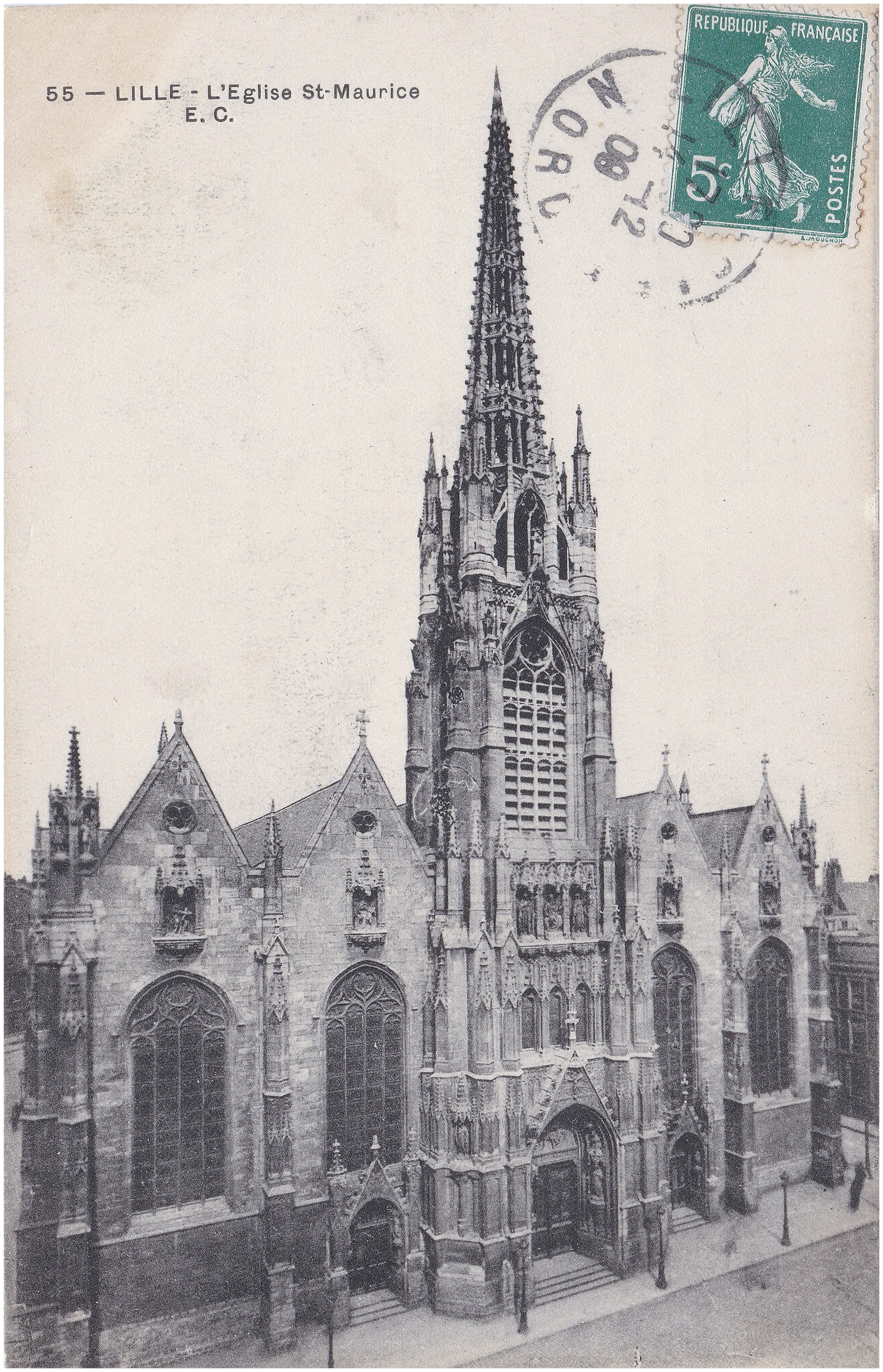 Lille (France - dép. du Nord) — L'église St Maurice en Ville Cette hallekerke a été construite à partir de la fin du XIVe siècle pour être achevée à la fin du XIXe siècle. Elle est de style gothique, mais XIXe siècle oblige, également de style néo gothique. Timbre 5 c, vert, sans sol 1907-1920 ; graveur : Louis Eugène Mouchon ; dessinateur : Louis Oscar Roty →